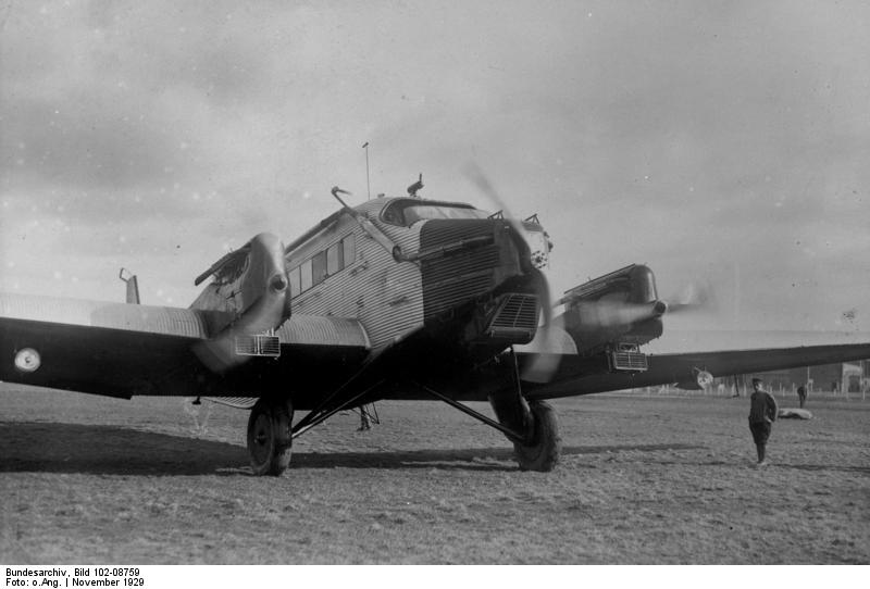 Der comfortabelste Schlafwagen der Luft! Der Schlafwagen der Luft, die grosse dreimotorige Junkersmaschine vor dem Start.